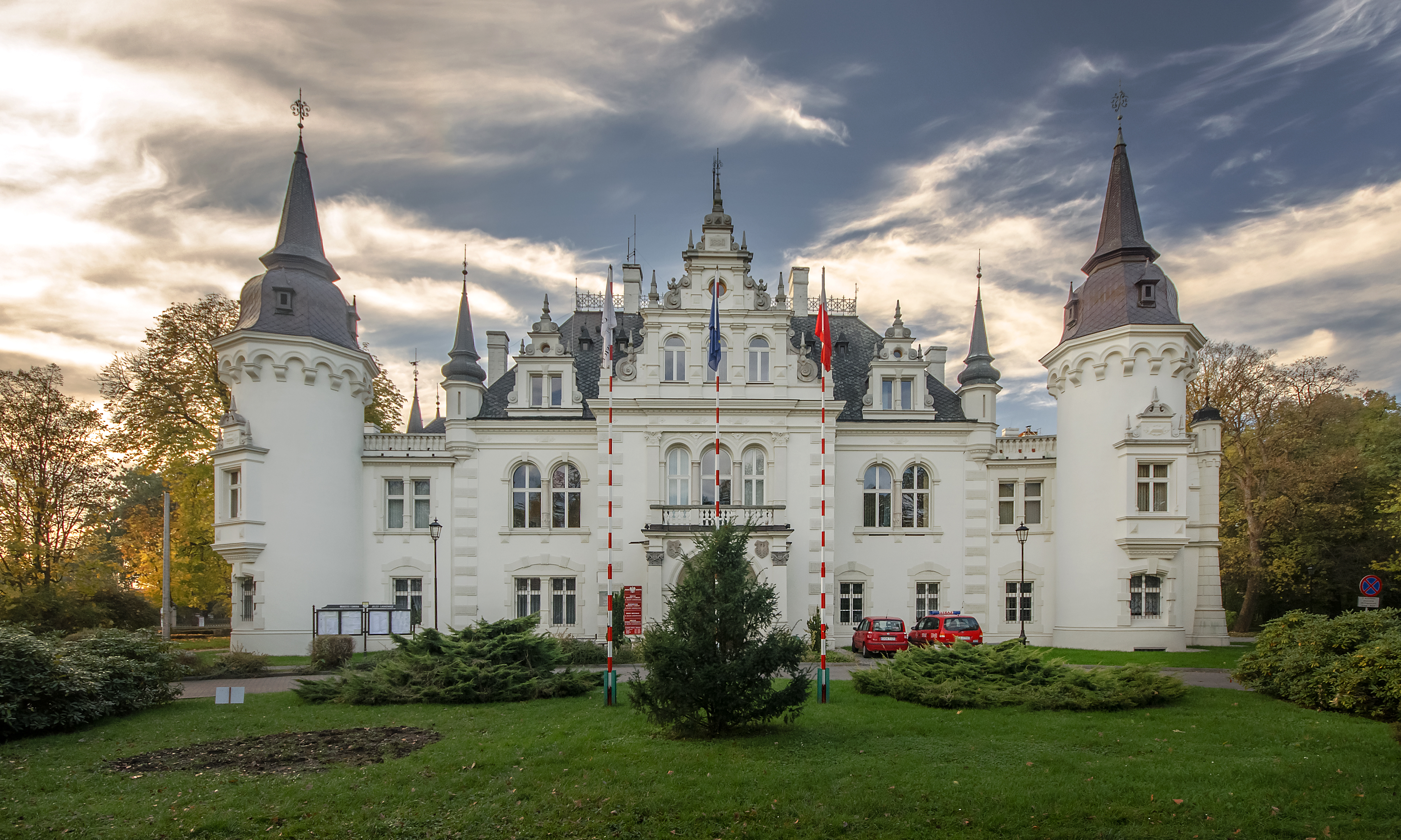 Jelcz-Laskowice, Pałac Sauermów, ob. UMiG, 1886